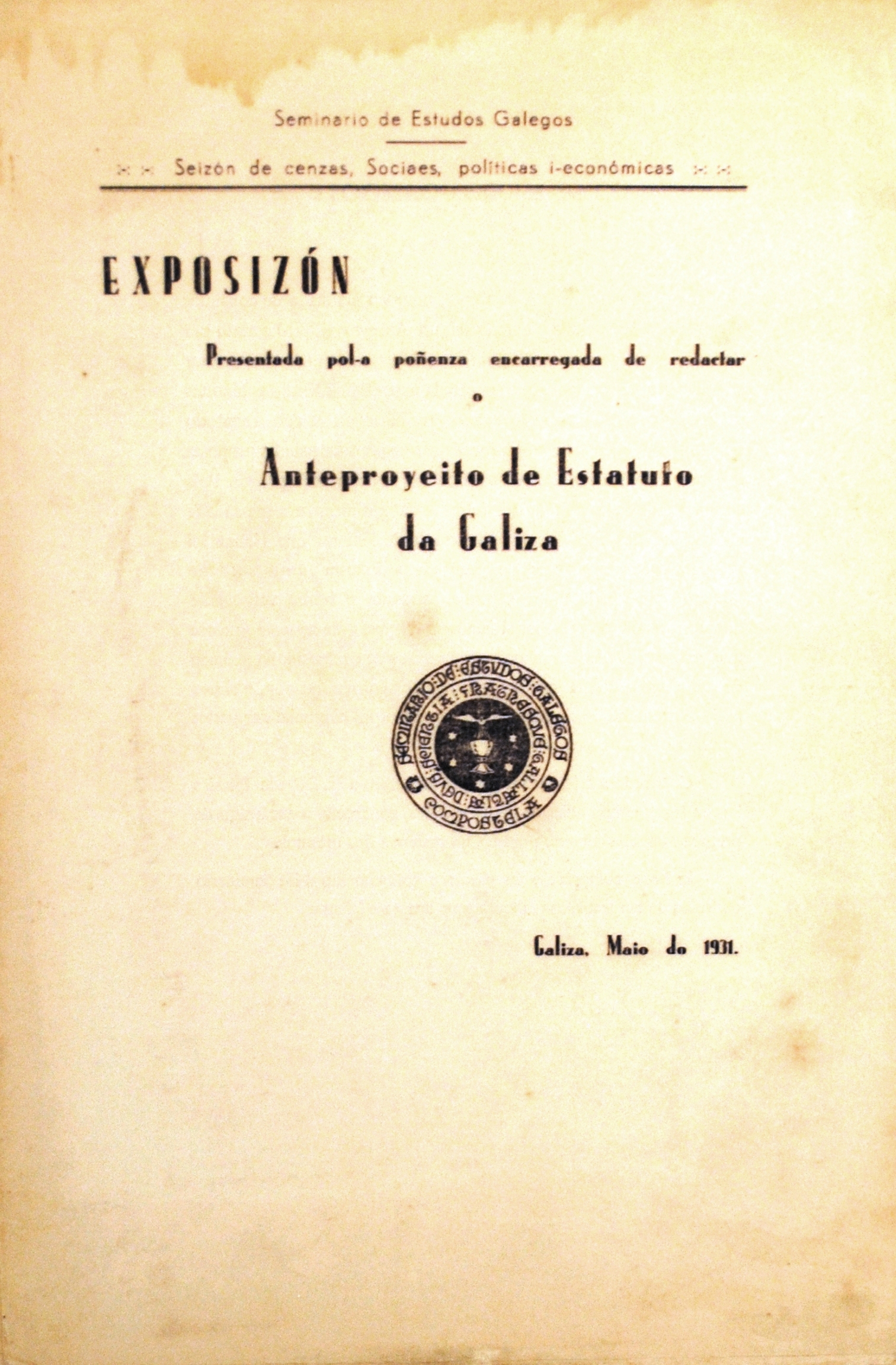 EXPOSIZÓN Presentada pol-a poñenza encarregada de redactar o Anteproyeito de Estatuto da Galiza